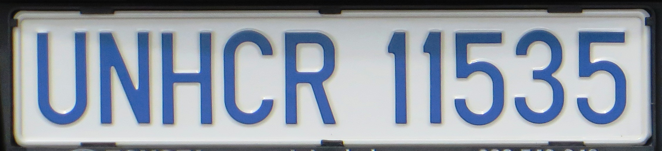 UNHCR kentekenplaat in Albanië